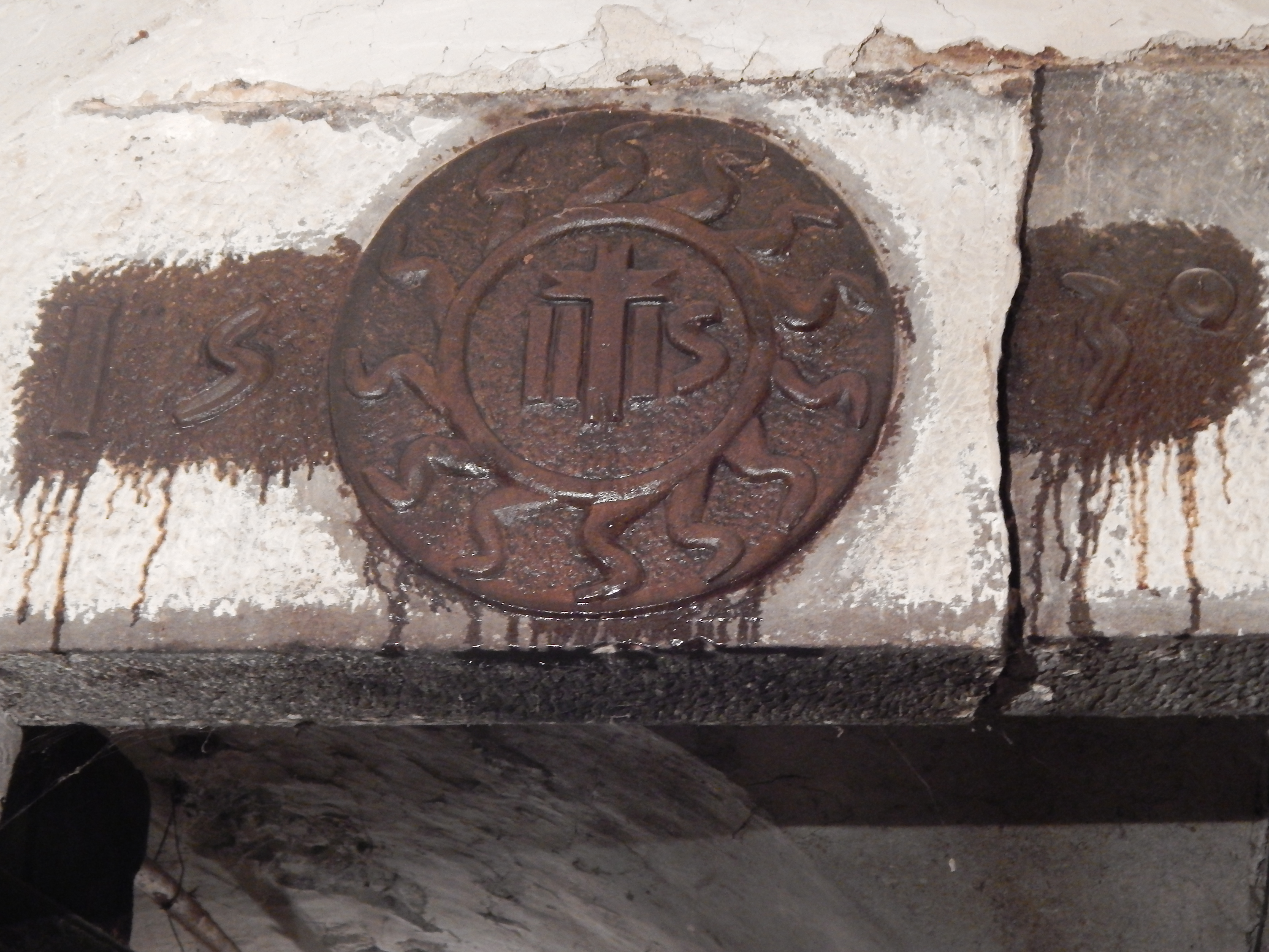 passaggio di San Bernardino da Siena a Tufo nel XV secolo